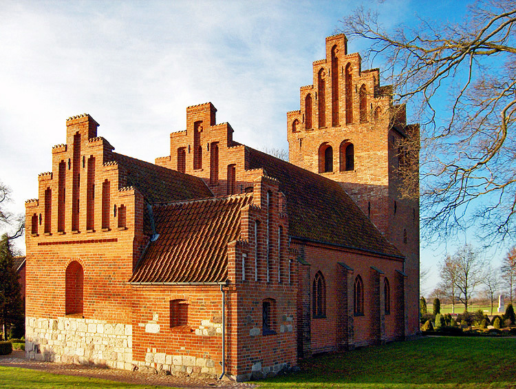 fra nordøst